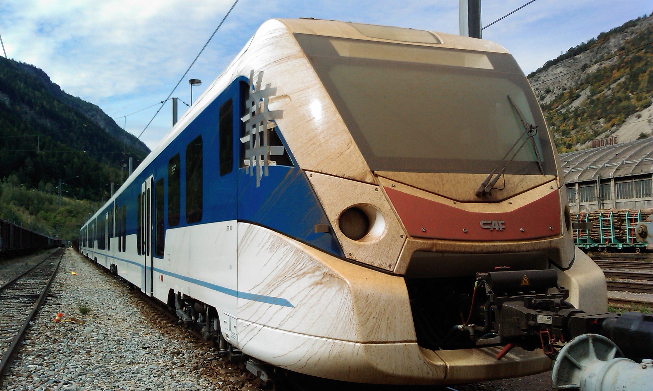 Automoteur CAF civity ETR 563 en gare de Modane (Savoie, France) à destination de l'Italie.